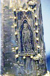 Niello-Platte vom Armreliquiar der Beatrix von Holte